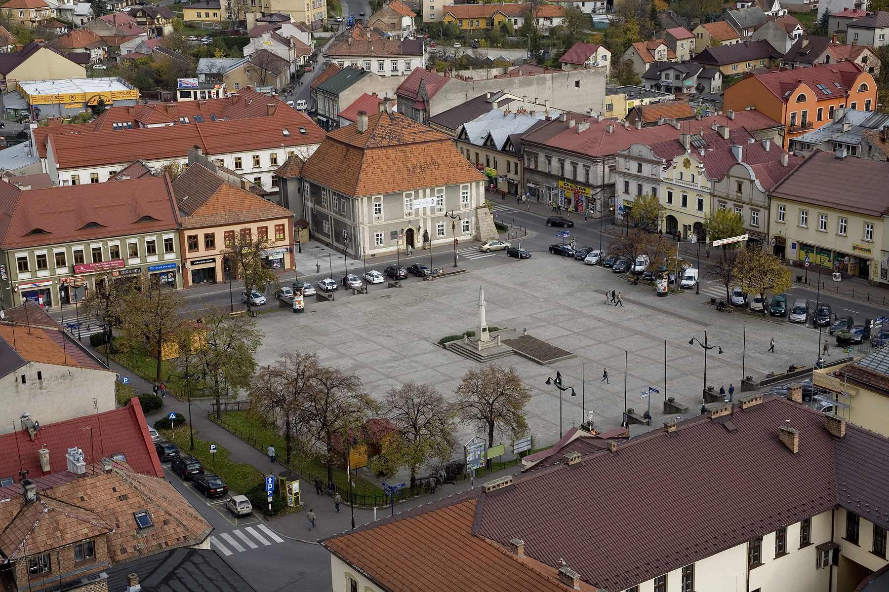 Widok układu urbanistycznego Bochni z wieży kościoła farnego